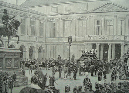 Willem 3 begrafenis.